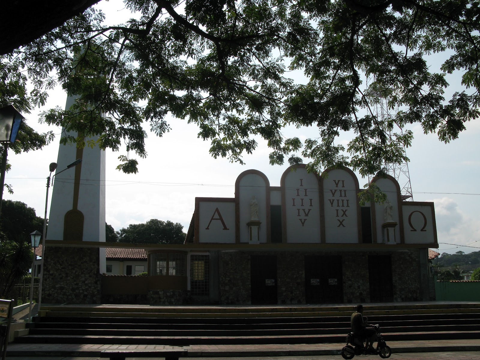 En la foto, podemos observar la iglesia de San Pablo.